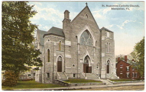 Saint Augustine Church, Montpelier